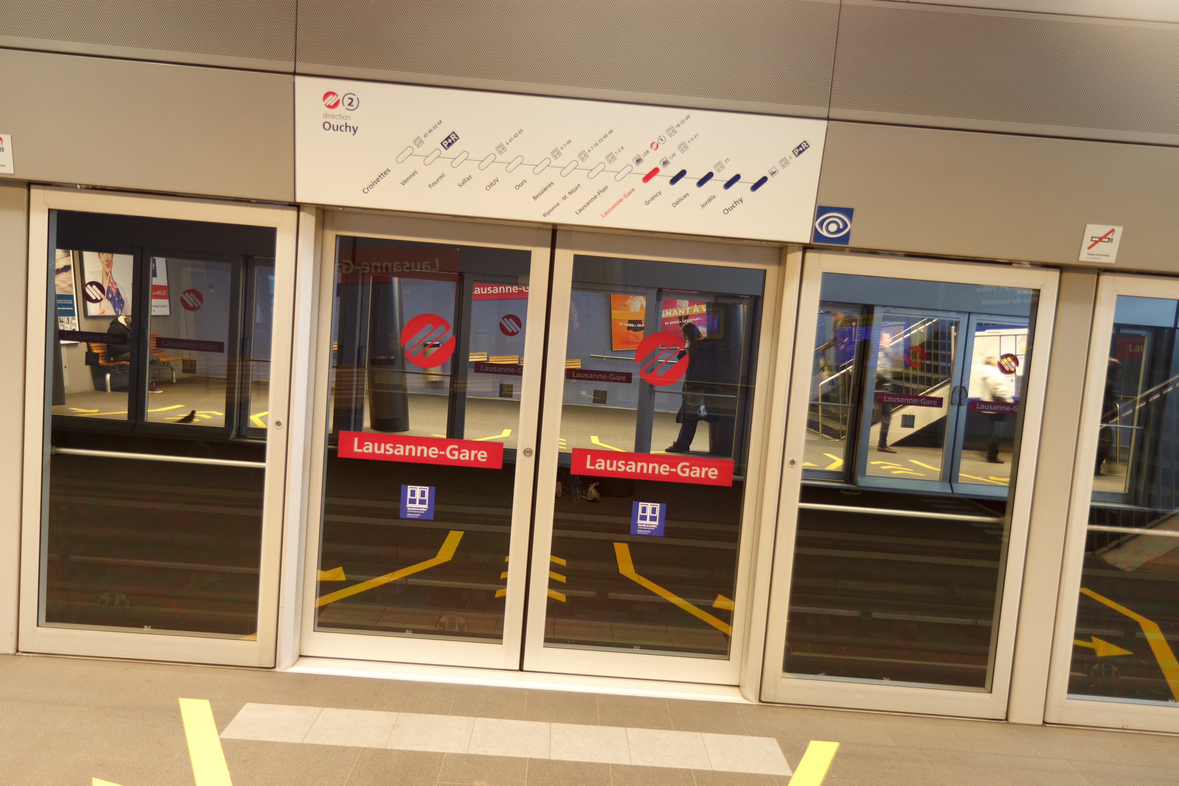 Portes de sécurité à la station de métro Lausanne-Gare.